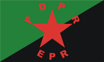 Bandera del EPR